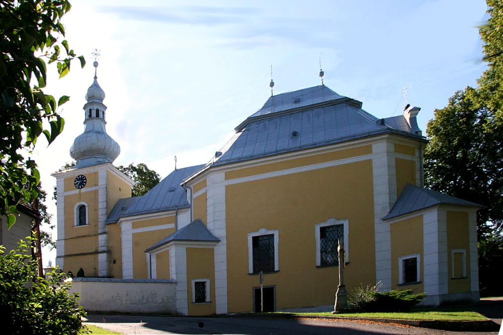 Kostel Navštívení Pany Marie v Obyčtově 591 01 Žďár nad Sázavou od Jana Blažeje Santiniho-Aichela 1730-34, postavený v půdorysu želvy, půdorys vyjadřuje čistotu, záštitu a stálost ve víře, podle jiných pramenů cudnost a stálost manželky v domě,(též bílá výmalba).